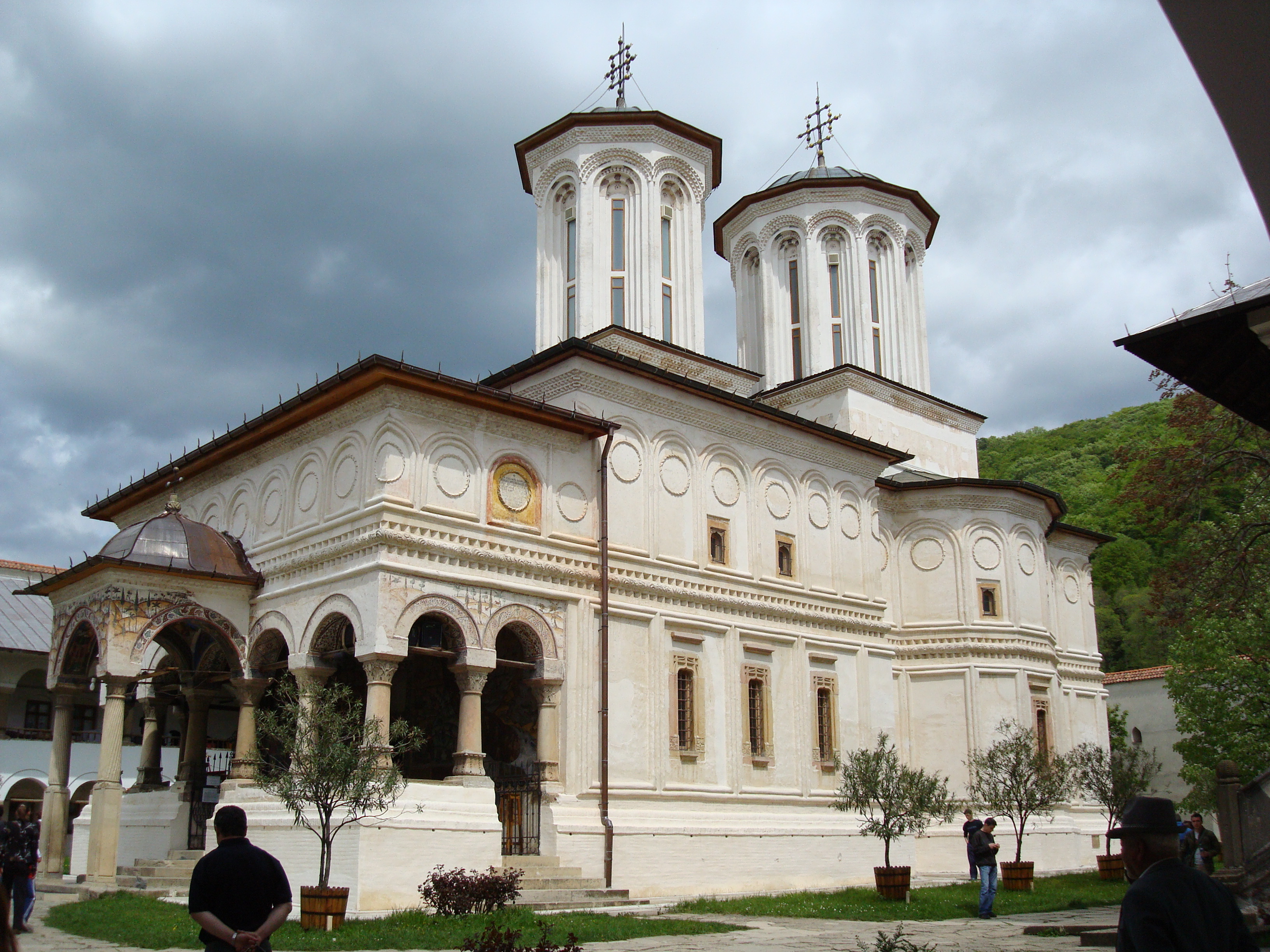 El monasterio de Horezu